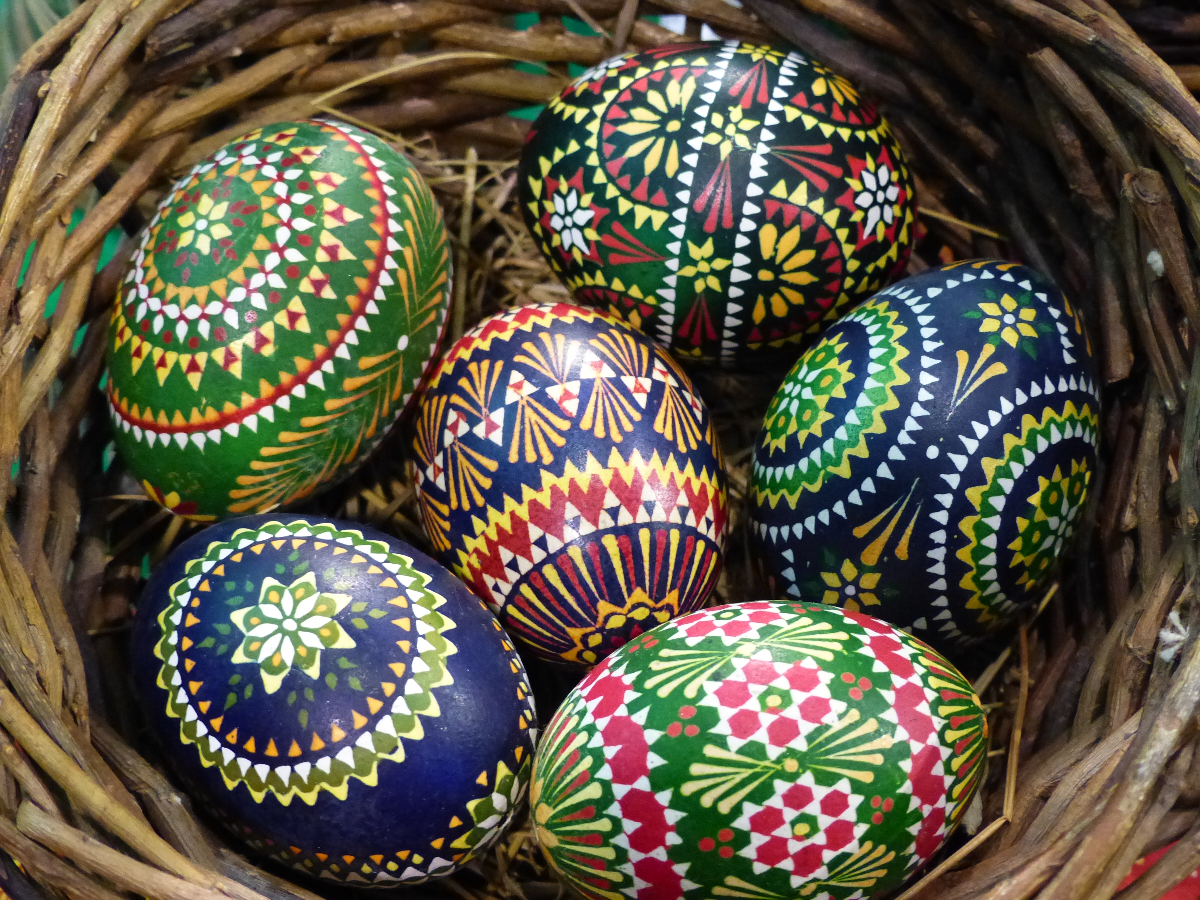 Sorbische Ostereiermalerei in Schleife (Landkreis Görlitz)